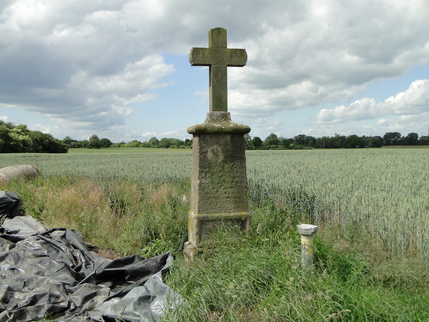 Das Wegekreuz befindet sich an der Verlängerung Am alten Pütz und dem Ispelgäschen. Das Kreuz wurde früher "et ruude Krücksje" genannt und um 1883 errichtet. Sogenannte Mordkreuze wurden früher stets rot gestrichen, dochwurde diese Sitte später auch auf sogenannte Unfallkreuze übertragen. Die Inschrift (Fraktur) ist stark verwittert. Einzelne Wörter sind noch lesbar, der Text kann jedoch nicht mehr rekonstruiert werden. Inschrift: keine